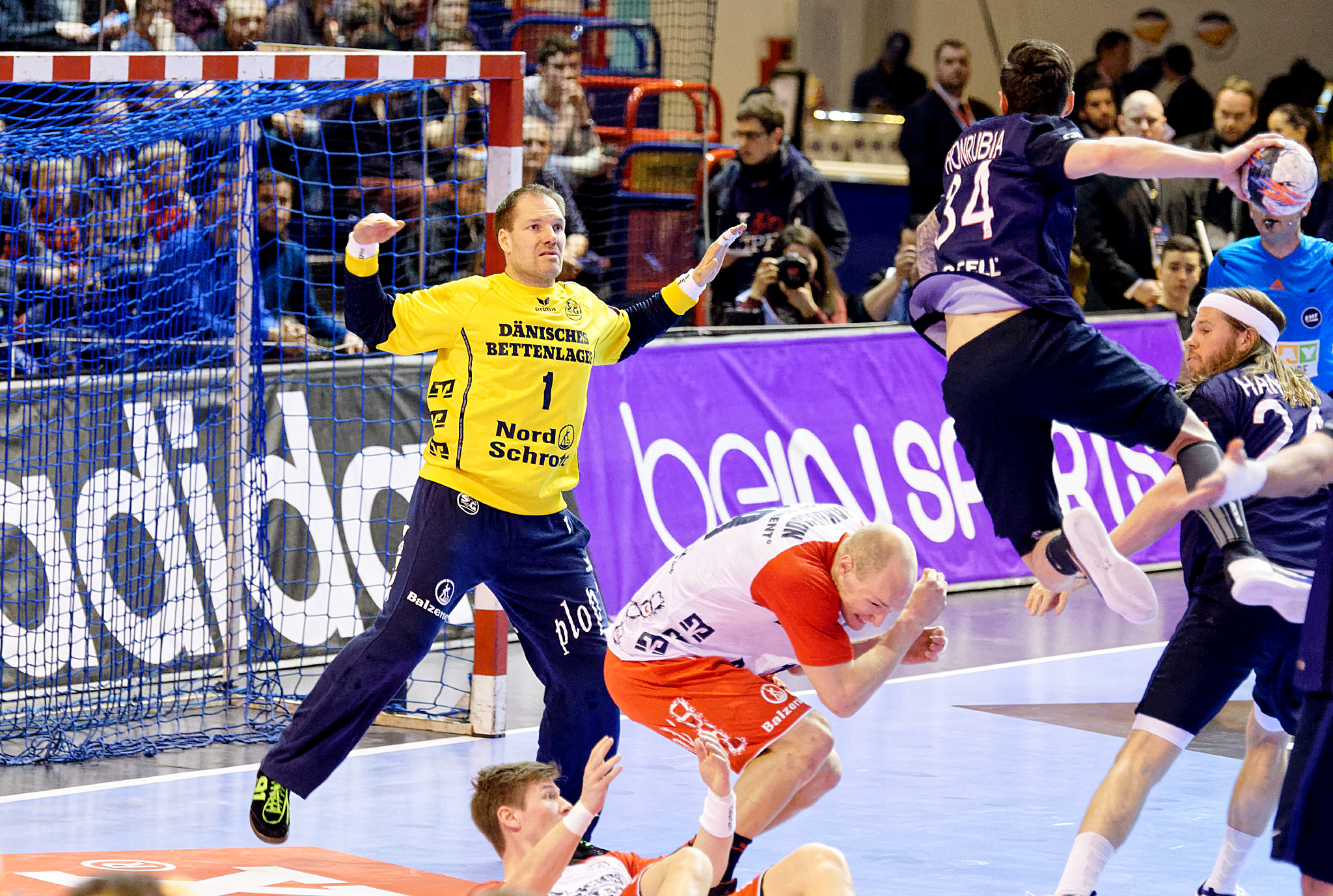 Rencontre de phase de groupe de la Ligue des Champions 2015-16 entre le PSG et SG Flensburg. A la Halle Carpentier (Paris), le 7 mars 2016.